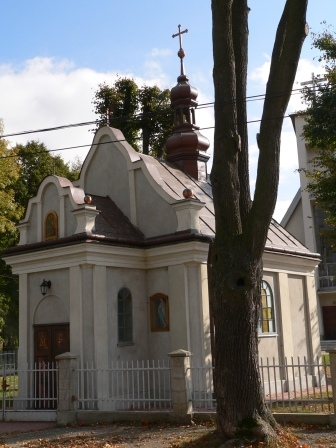 Widok zewnętrzny kaplicy w Korniaktowie.